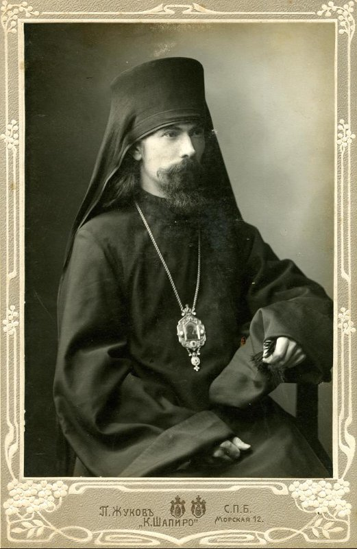 Епископ Феофан (Быстров), ректор Санкт-Петербургской духовной академии Место съемки: Санкт-Петербург (ул. Морская, 12) Место хранения: Рыбинский музей-заповедник